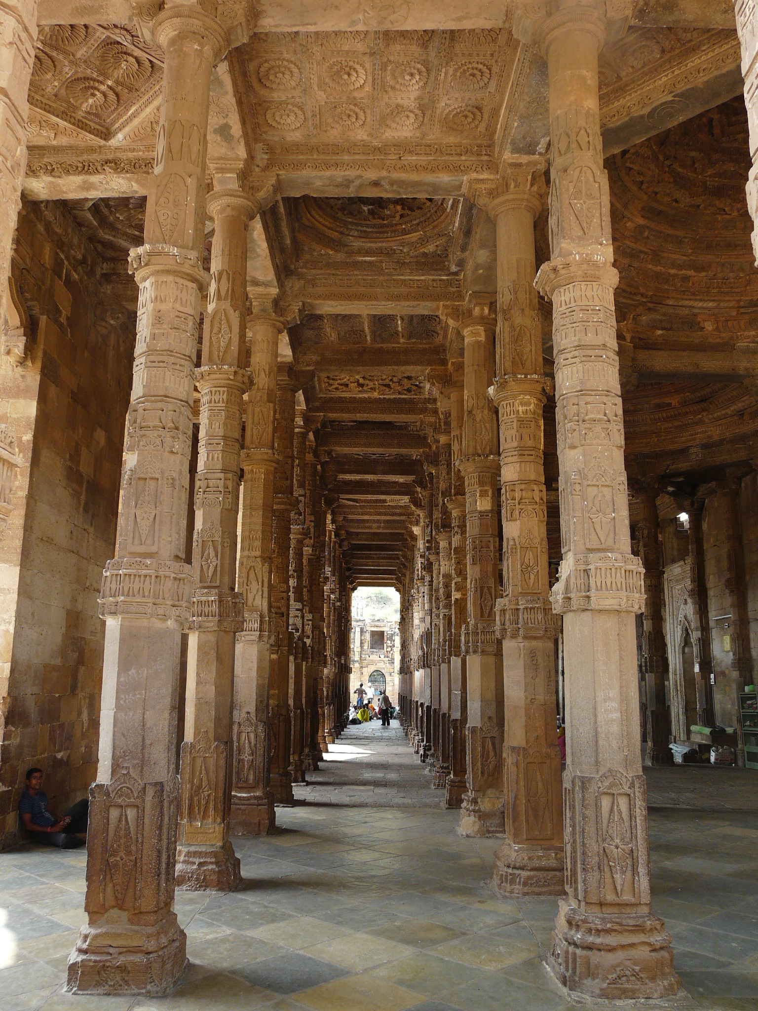 Arcade Adhai Din-ka-Jhonpra, Ajmer, Rajasthan, India